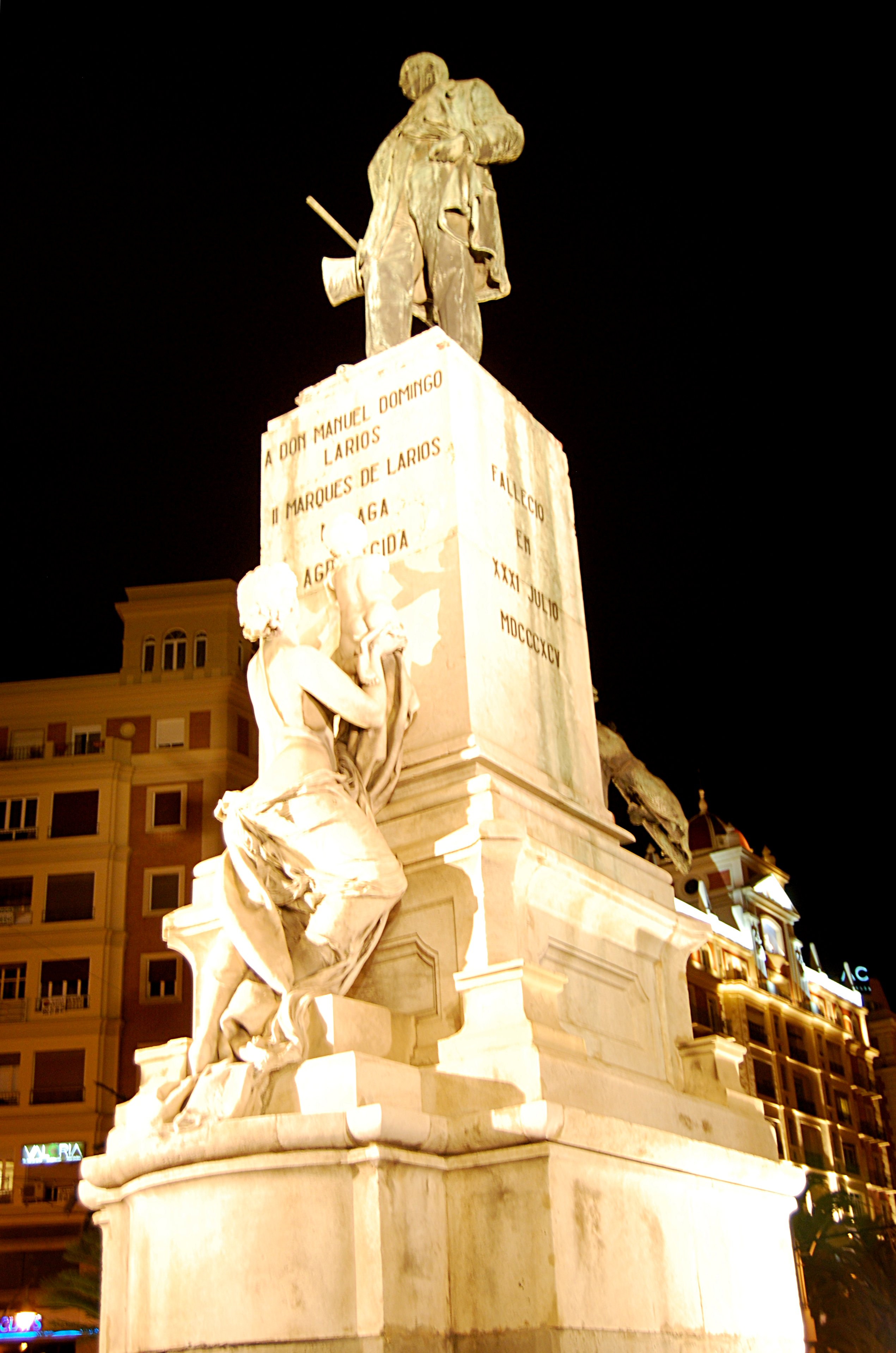 Monumento al Marqués de Larios, Málaga, España.